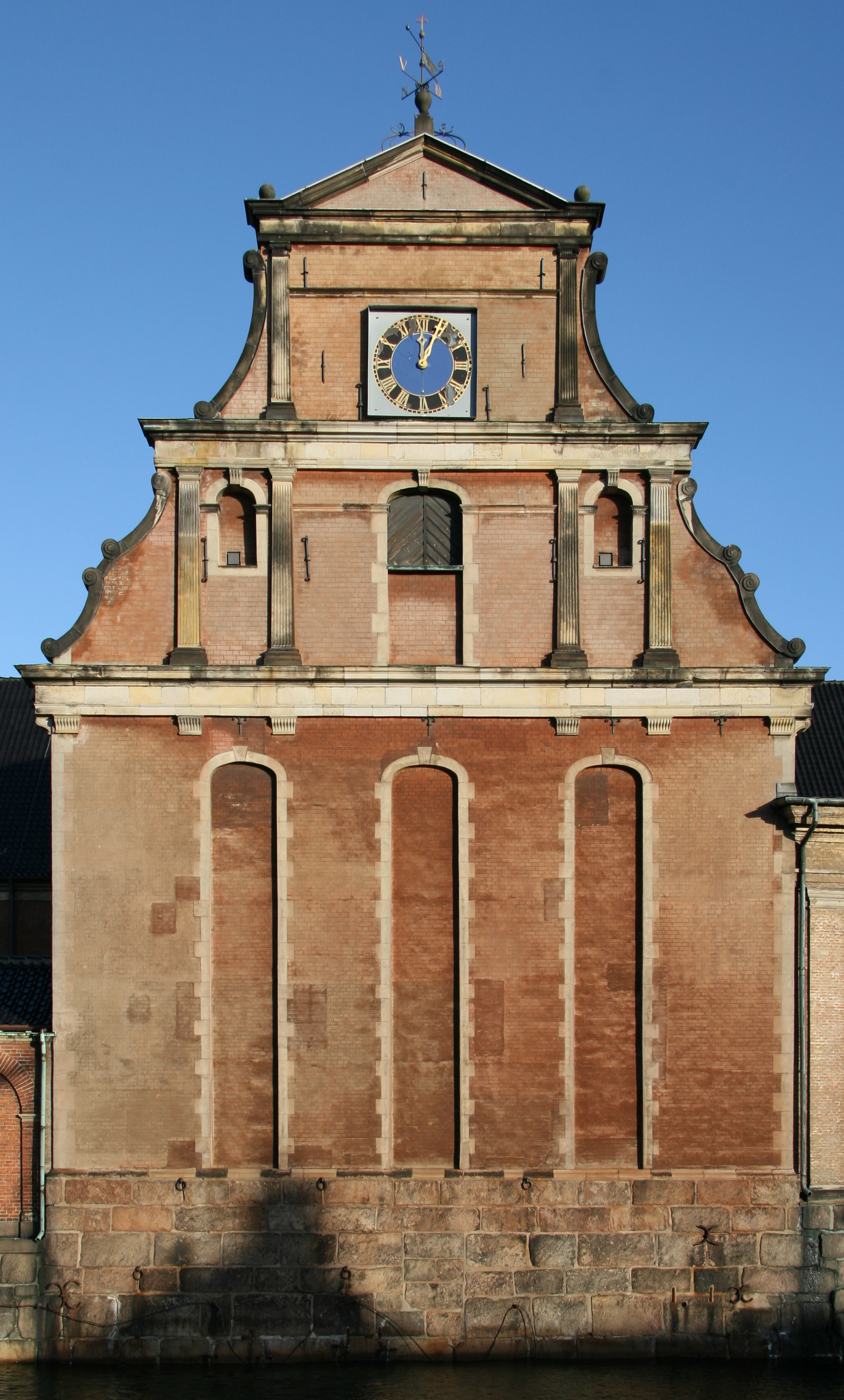 Holmens Kirke, Copenhagen, Denmark . Vestgavl.